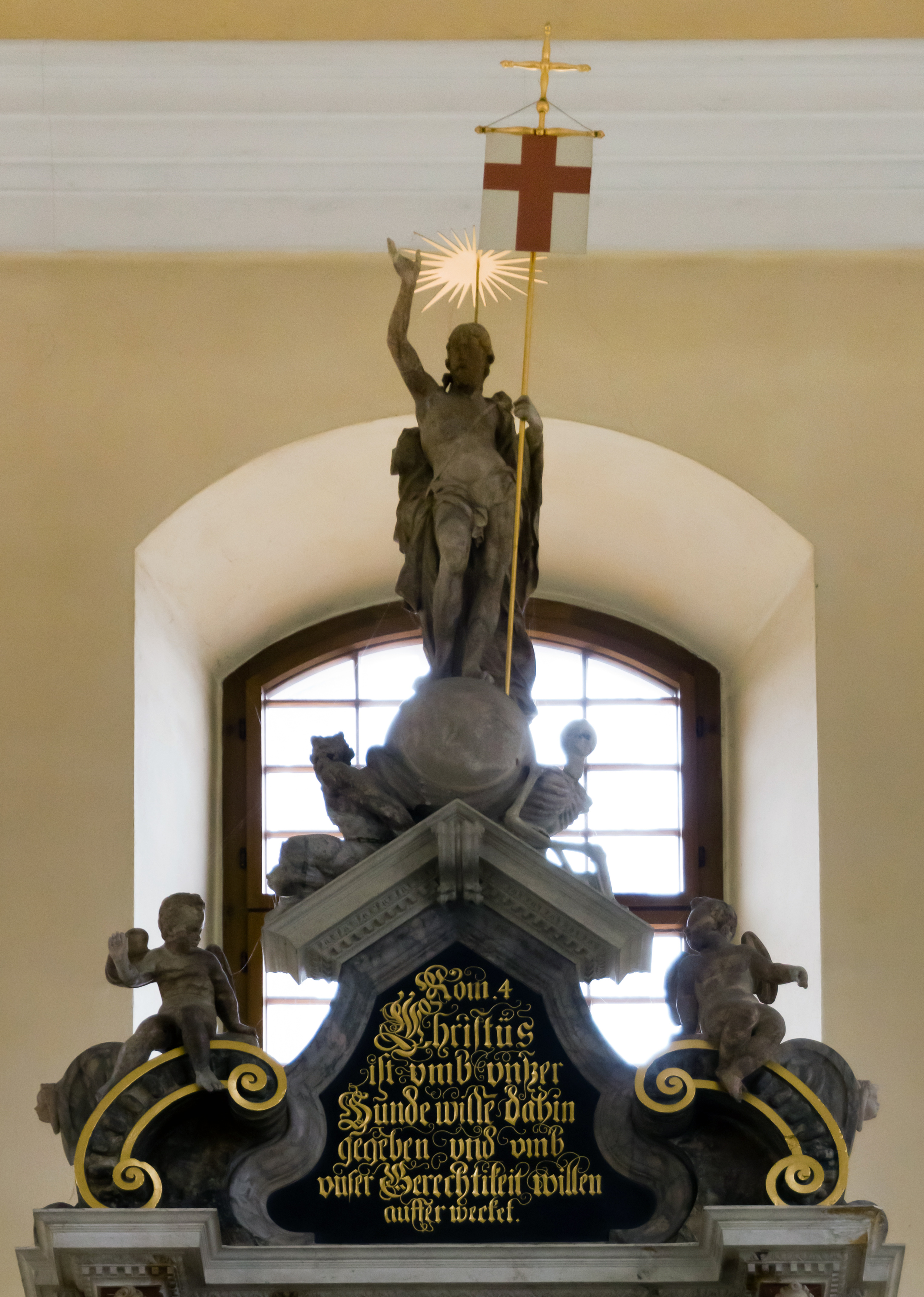 Nosseni-Altar, Christus auf der Weltkugel. Retousche: obere Bildhälfte etwas aufgehellt. Jesus ist unscharf....